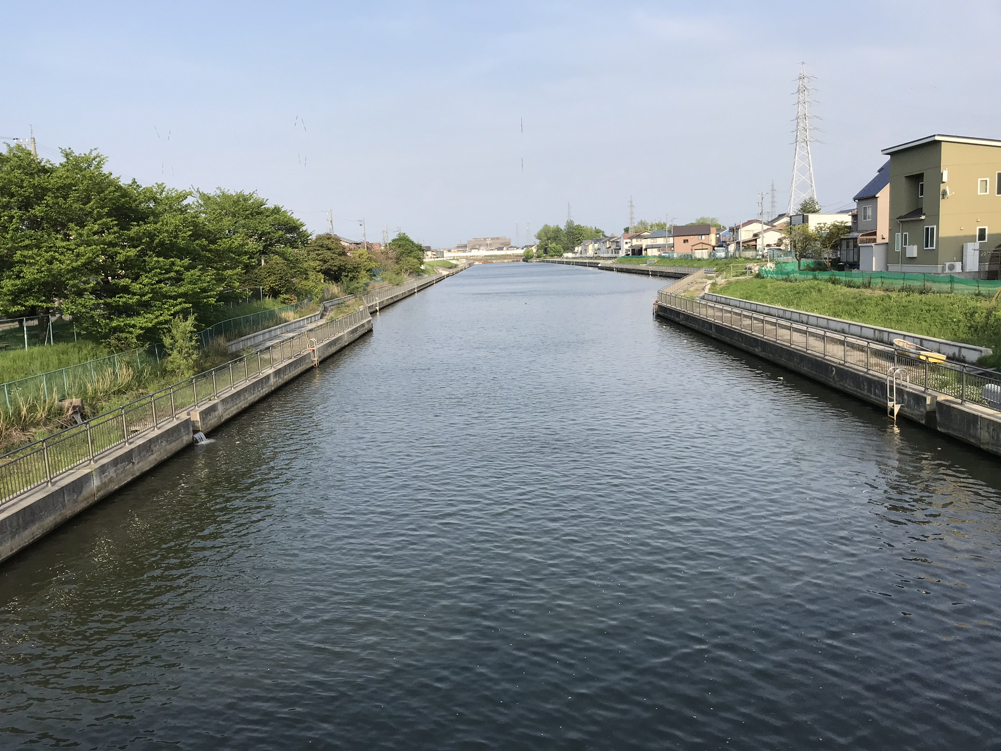 住友運河2